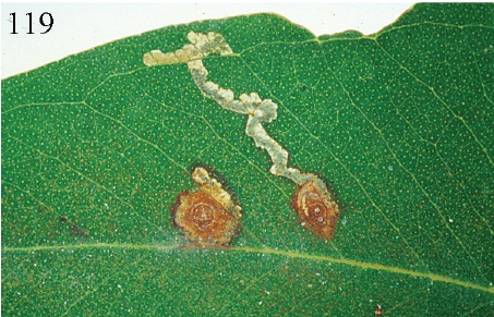 Pectinivalva scotodes